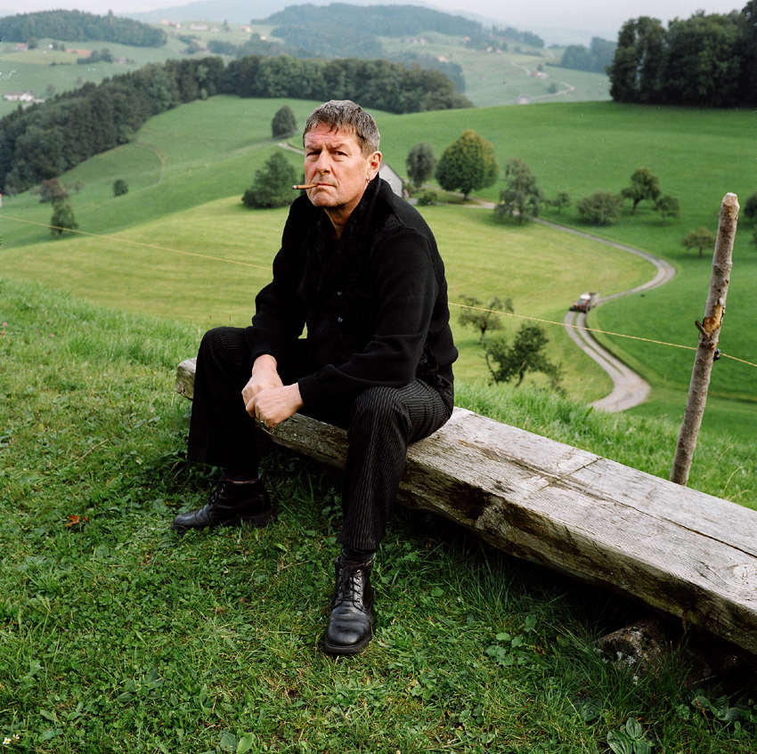 Stefan Signer im Jahr 2008